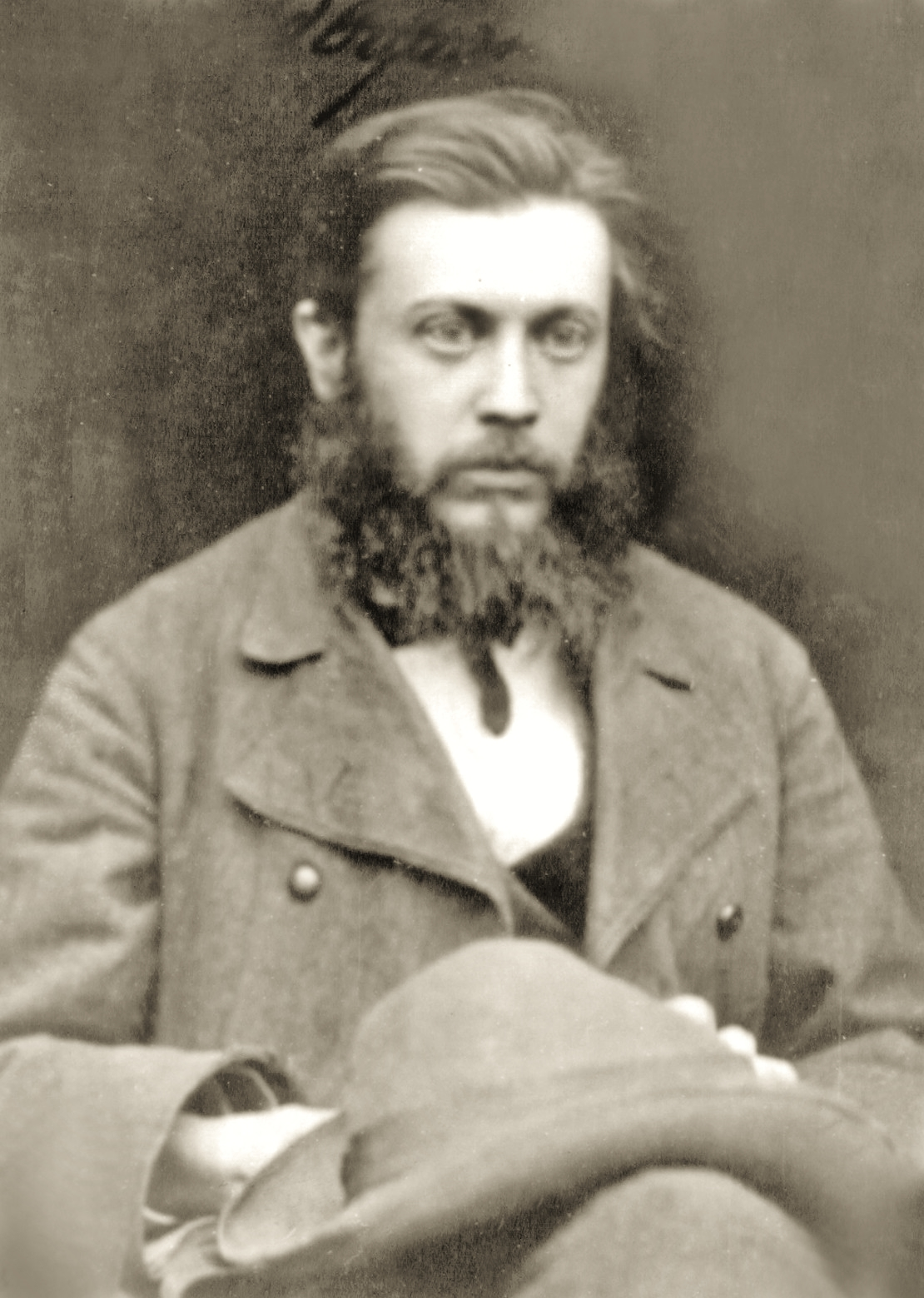 Дмитро Лизогуб: фото